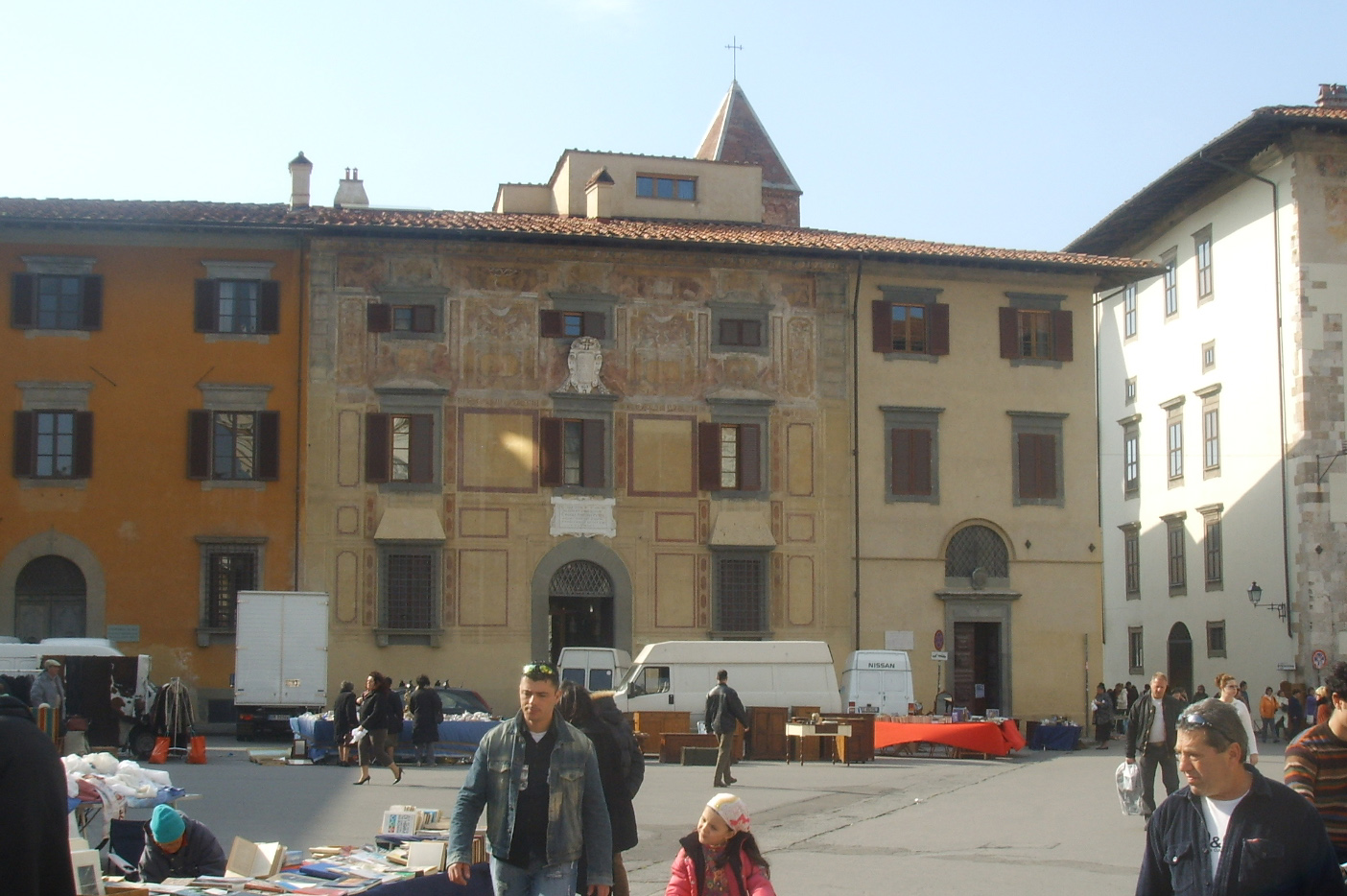 Palazzo_del_Collegio_Puteano_e_s._rocco.JPG